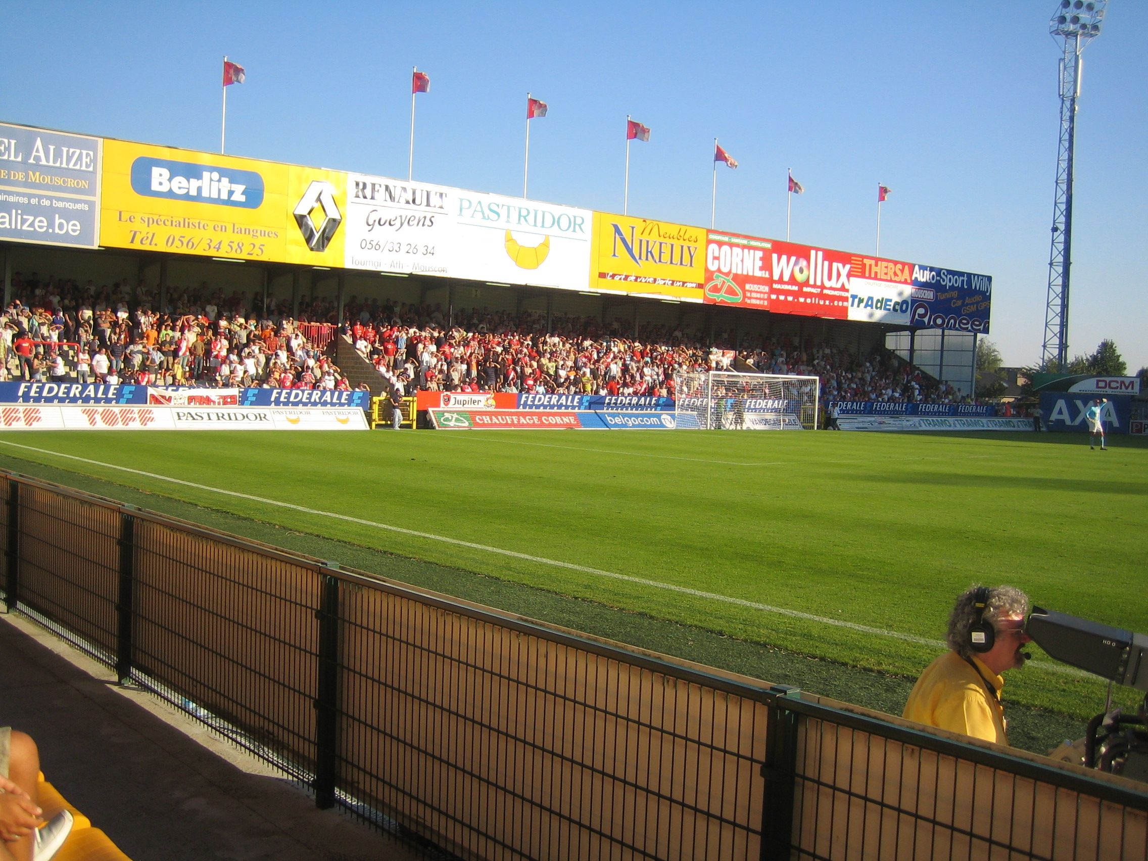 La tribune Sud qui acceuille le Kop, du Canonnier